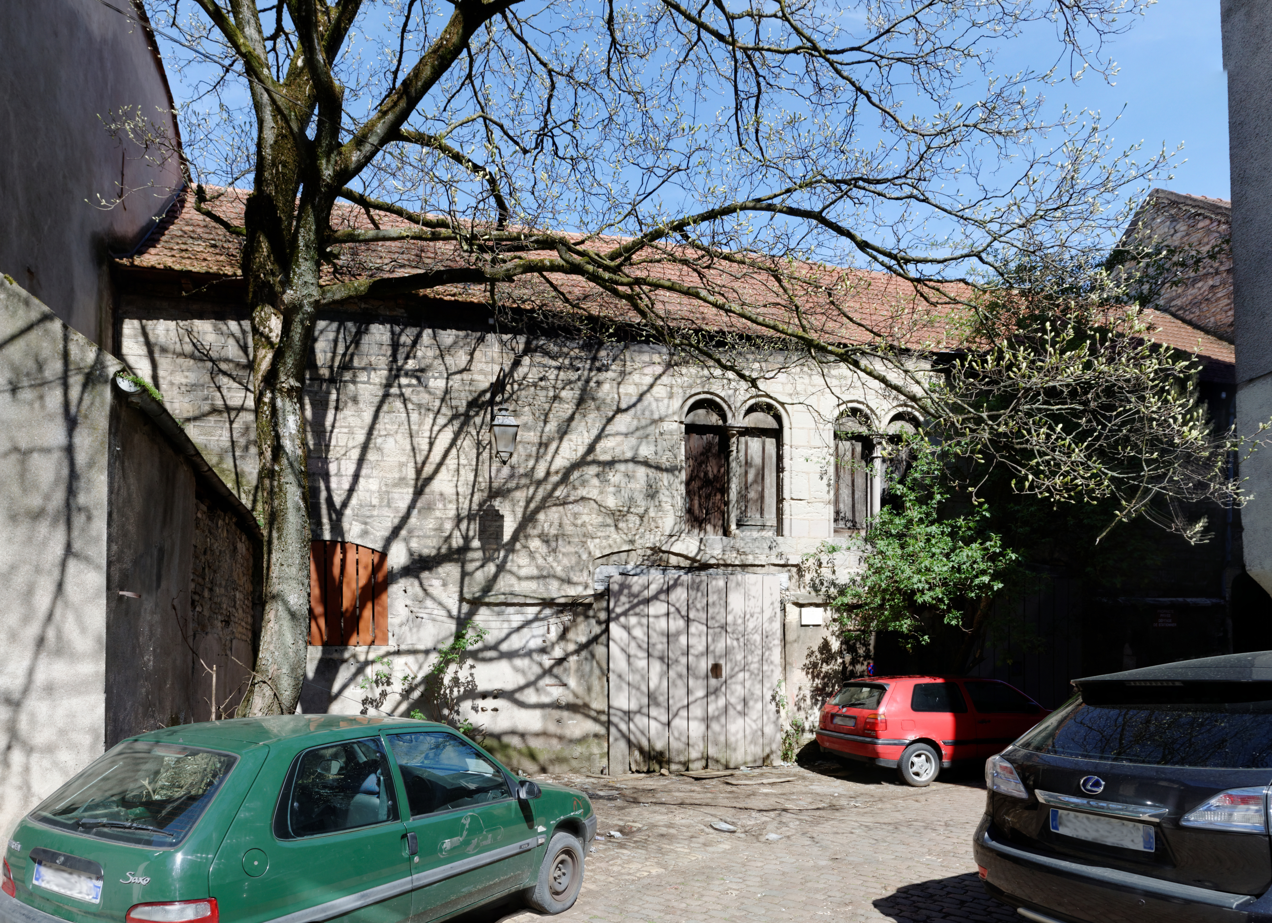 Cellier de Morimond, Cour Magdeleine - Place Émile-Zola, à Dijon (Inscrit, 1947) Dépendant de l'Abbaye cistercienne de Morimond (Haute Marne)